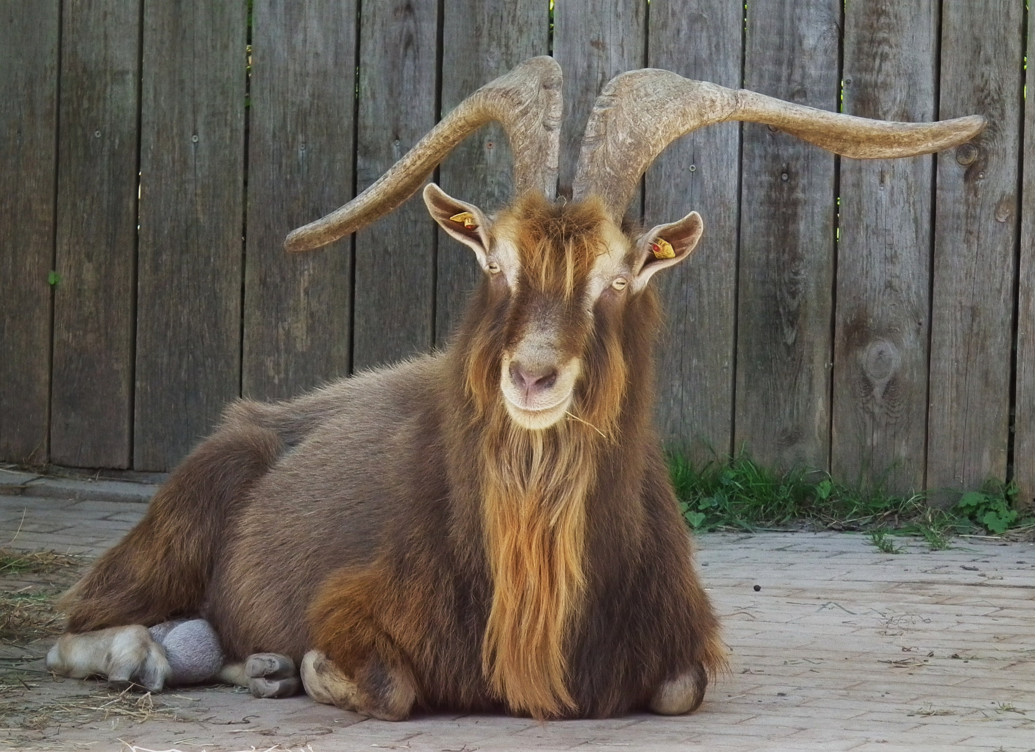 Thüringer Waldziege im Tiergarten Worms (Rheinland-Pfalz, Deutschland)